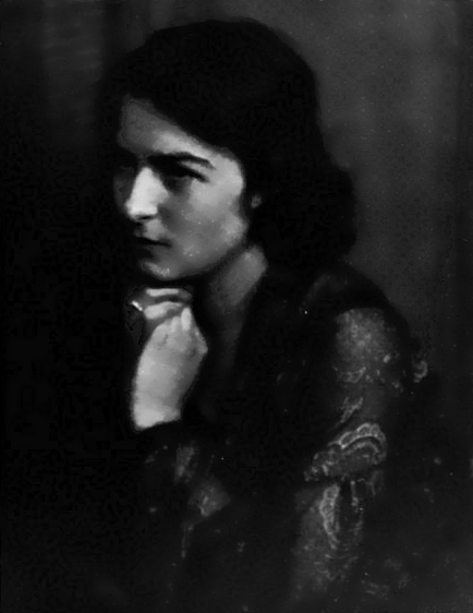 Joanna Roos portrait photo